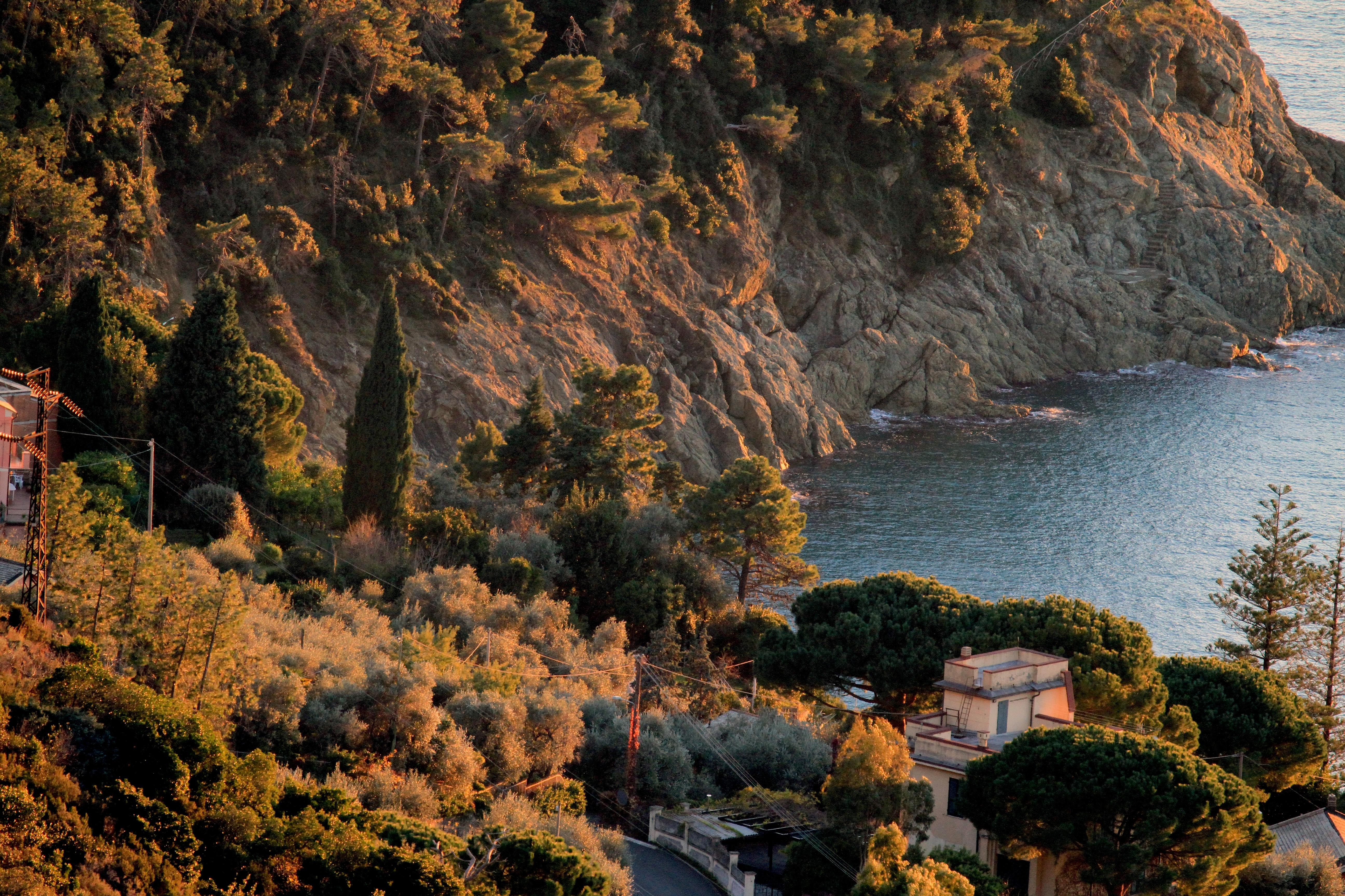 La calda luce del tramonto